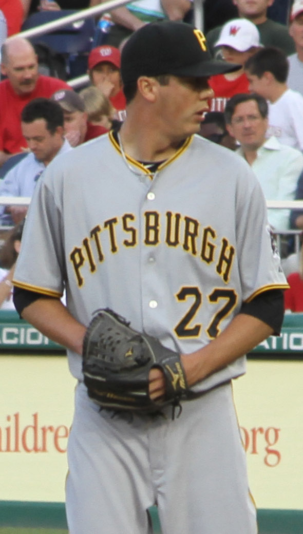 Jeff Karstens